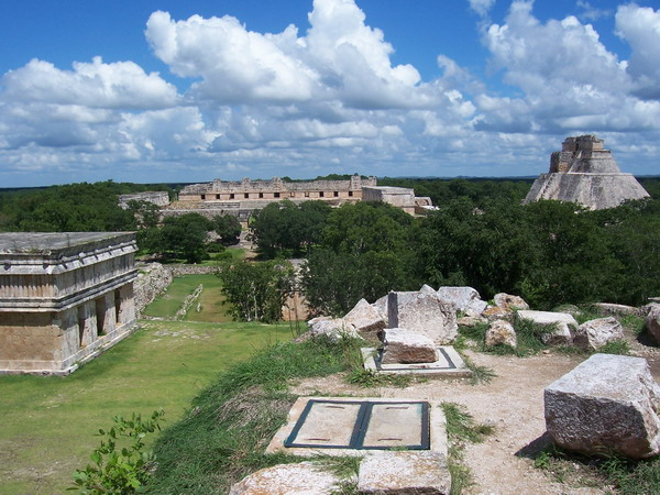 Uxmal